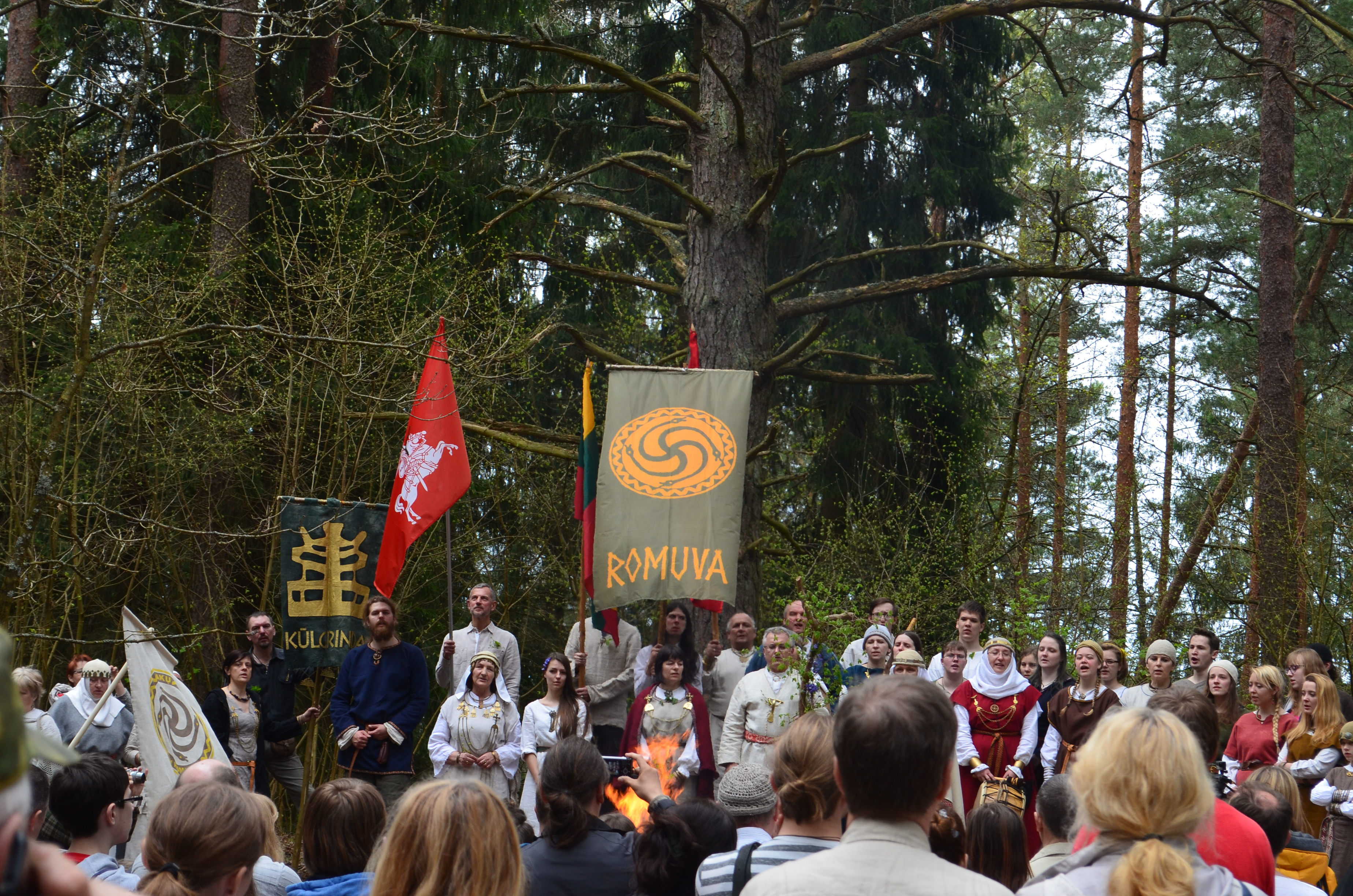 Jorės šventė 2015 m., Kulionyse